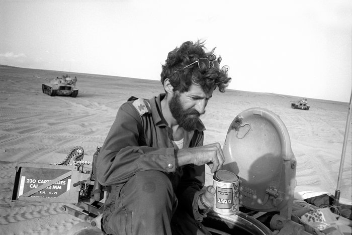 מג"ד 196 (97?), סא"ל עמרם מצנע, "מתדלק" לקראת הקרב הבא.